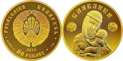 Білоруська монета